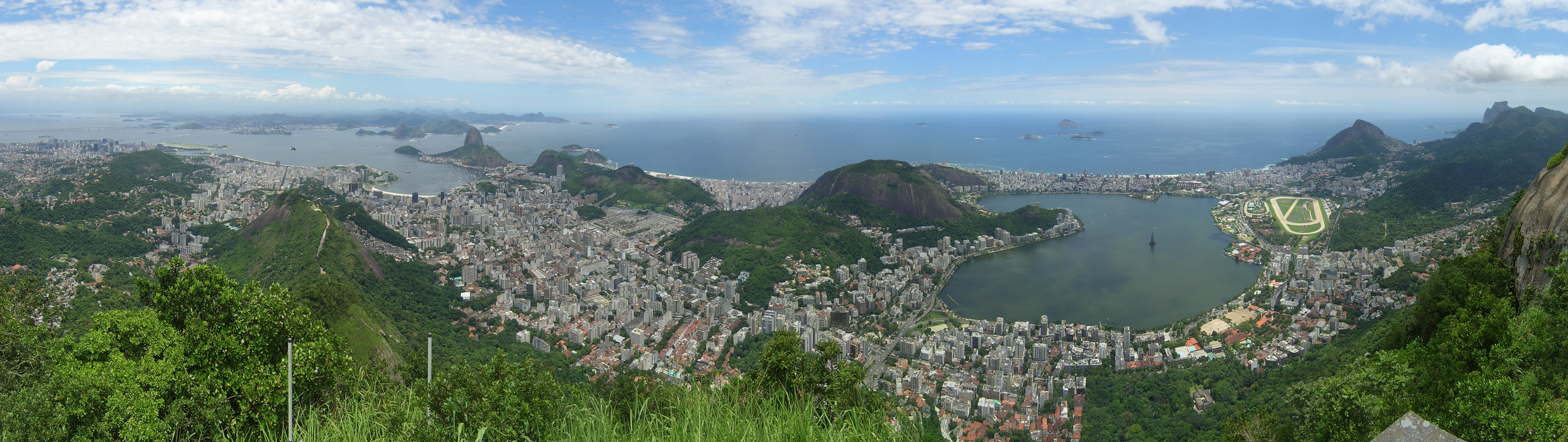 Rio de Janeiro, Panoramabild vom Corcovado gesehen. Panoramabild, mit Hugin0.7.0 und Enblend3.2 zusammengesetzt.